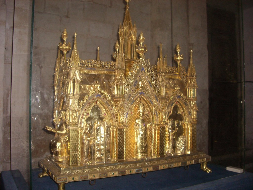 Châsse Saint Taurin - détails